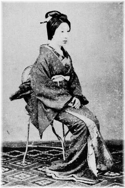 中根幸(徳川慶喜側室)の肖像写真